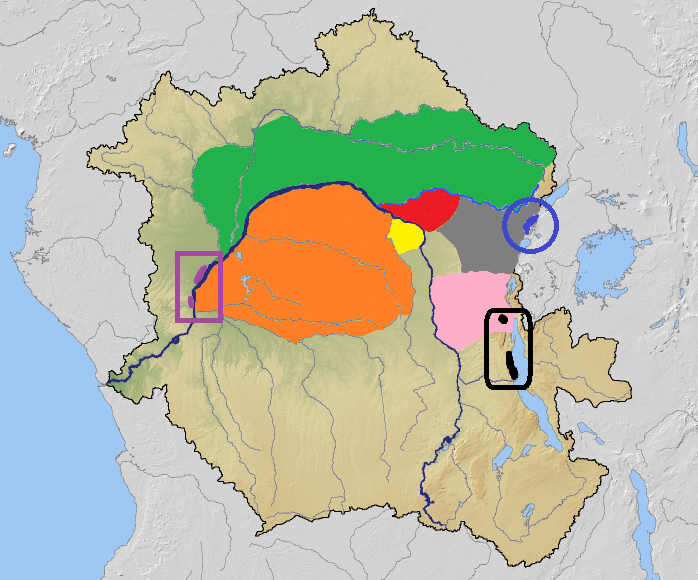 Verbreitungsgebiete der zentralafrikanischen Arten der Roten Stummelaffen (Piliocolobus), grün Oustalet-Stummelaffe (P. oustaleti), orange Thollon-Stummelaffe (P. tholloni), rot Lualaba-Stummelaffe (P. langi), gelb Lomami-Stummelaffe (P. parmentieri), rosa Luvua-Stummelaffe (P. foai), dunkelblau Semliki-Stummelaffe (P. semlikiensis), violett Bouvier-Stummelaffe (P. bouvieri), grau Hybridisierungsgebiet. Quelle: Russell A. Mittermeier, Anthony B. Rylands & Don E. Wilson: Handbook of the Mammals of the World: - Volume 3. Primates. Lynx Editions, 2013 ISBN 978-8496553897